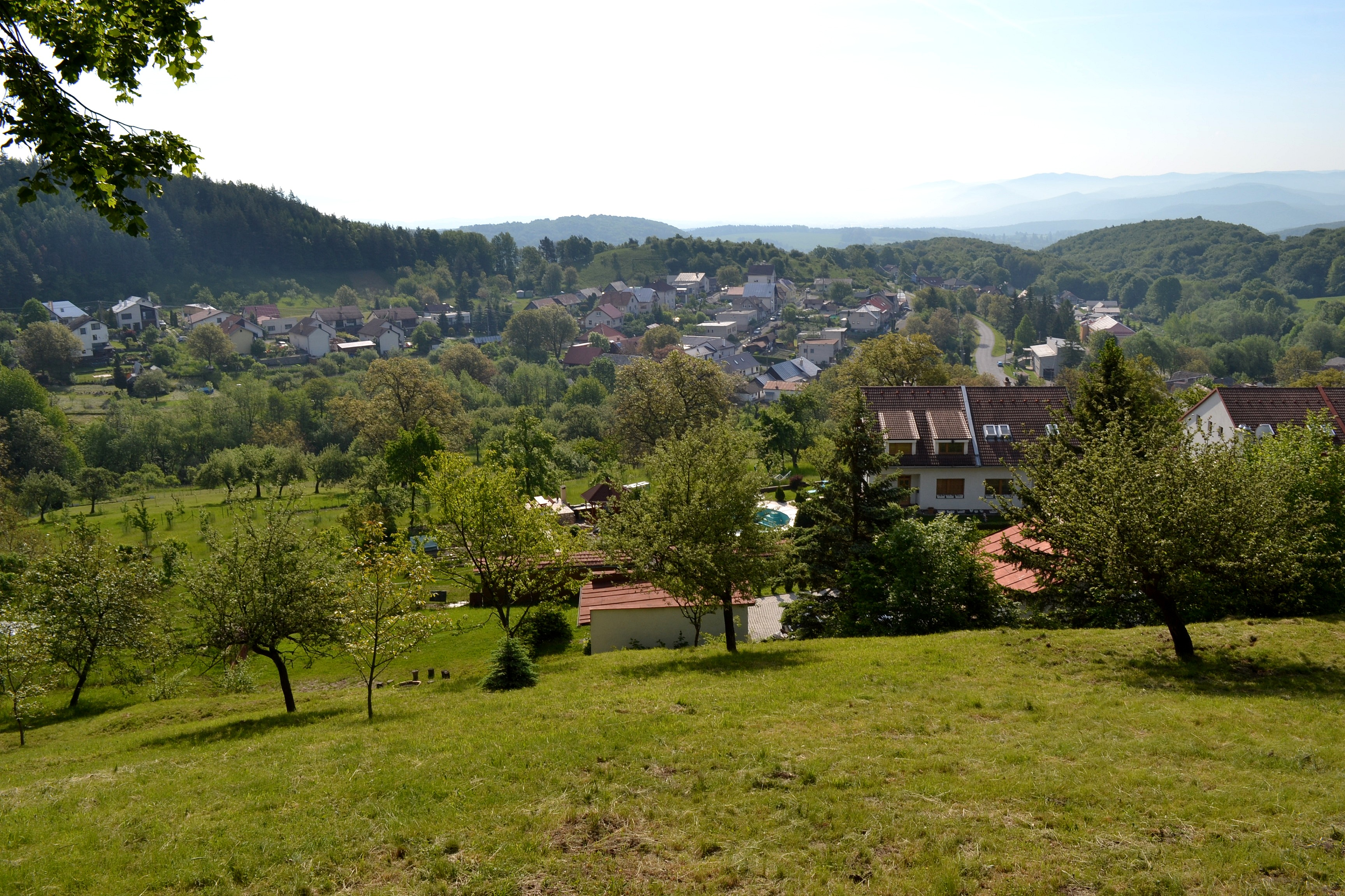 Tŕnie (okr. Zvolen), pohľad na obec od Kostola svätého Martina